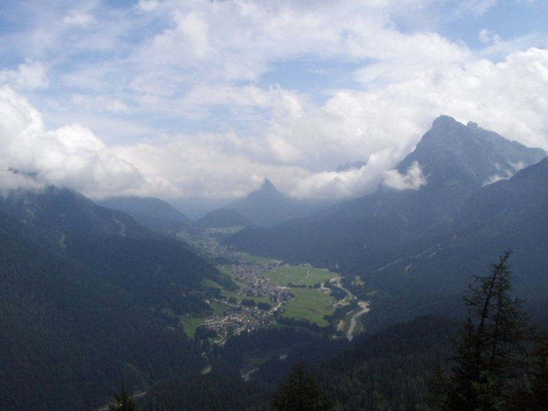 Sappada, Veneto, Italy